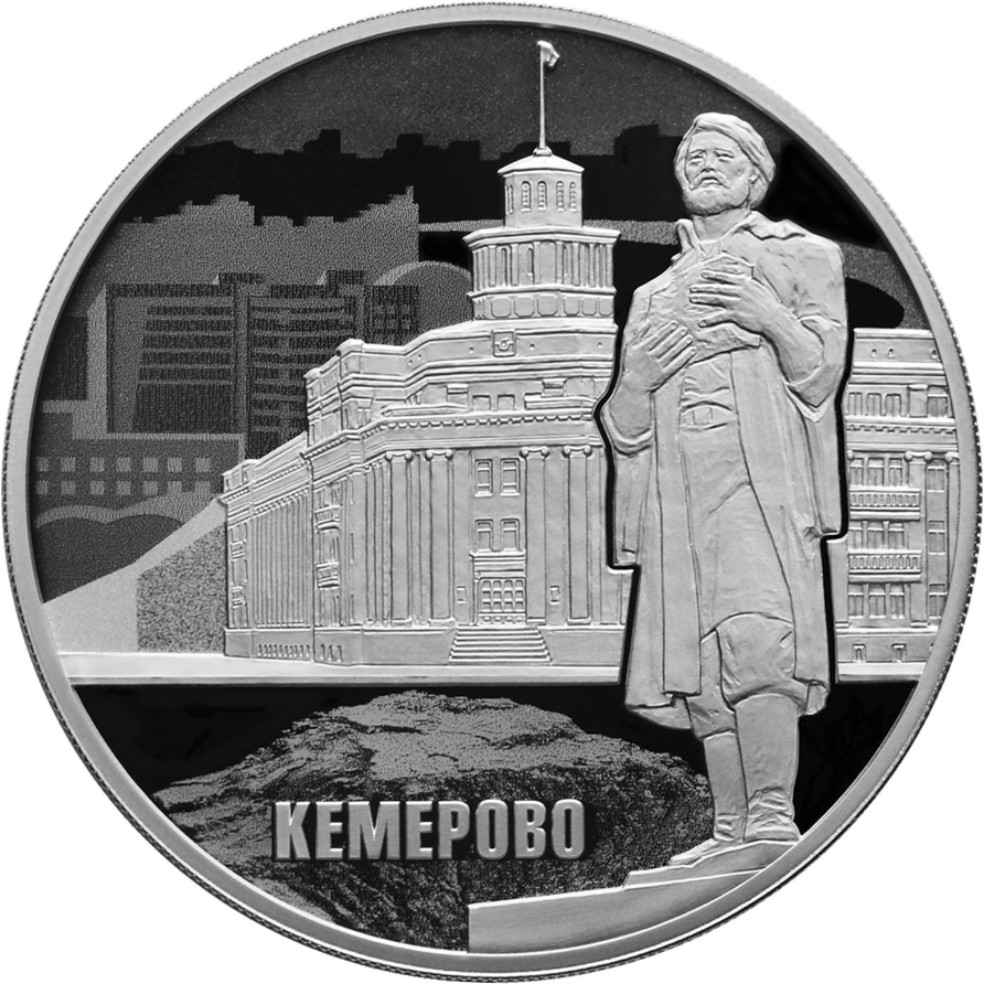 Монета Банка России — 100-летие основания г. Кемерово. 3 рубля, серебро, реверс, пруф. Изображения памятника М. Волкову и здания администрации г. Кемерово на фоне силуэтов городских зданий, внизу — надпись: «КЕМЕРОВО». Чеканка: Санкт-Петербургский монетный двор. Художник: А.Д. Щаблыкин. Скульптор: А.Н. Бессонов.